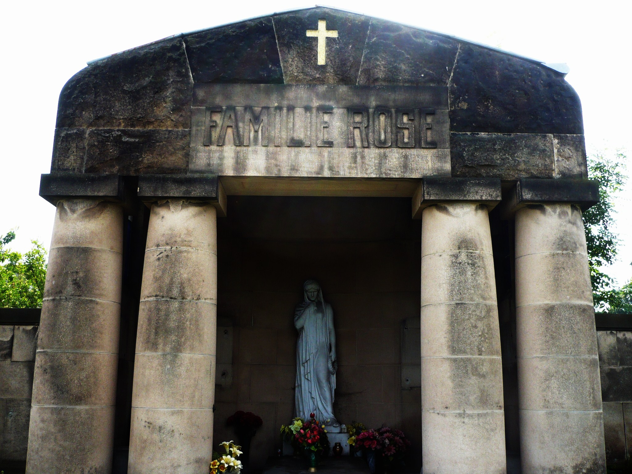 Nowa Ruda, ul. Cmentarna - cmentarz komunalny (grobowiec rodziny Rose)